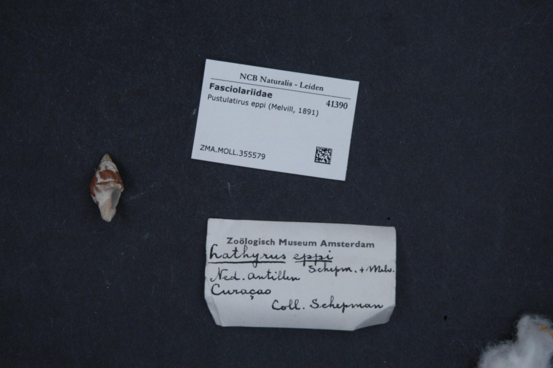 Pustulatirus eppi (Melvill, 1891)